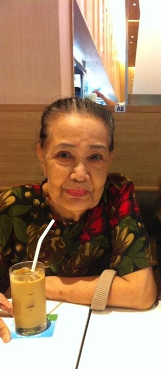 วิไลวรรณ